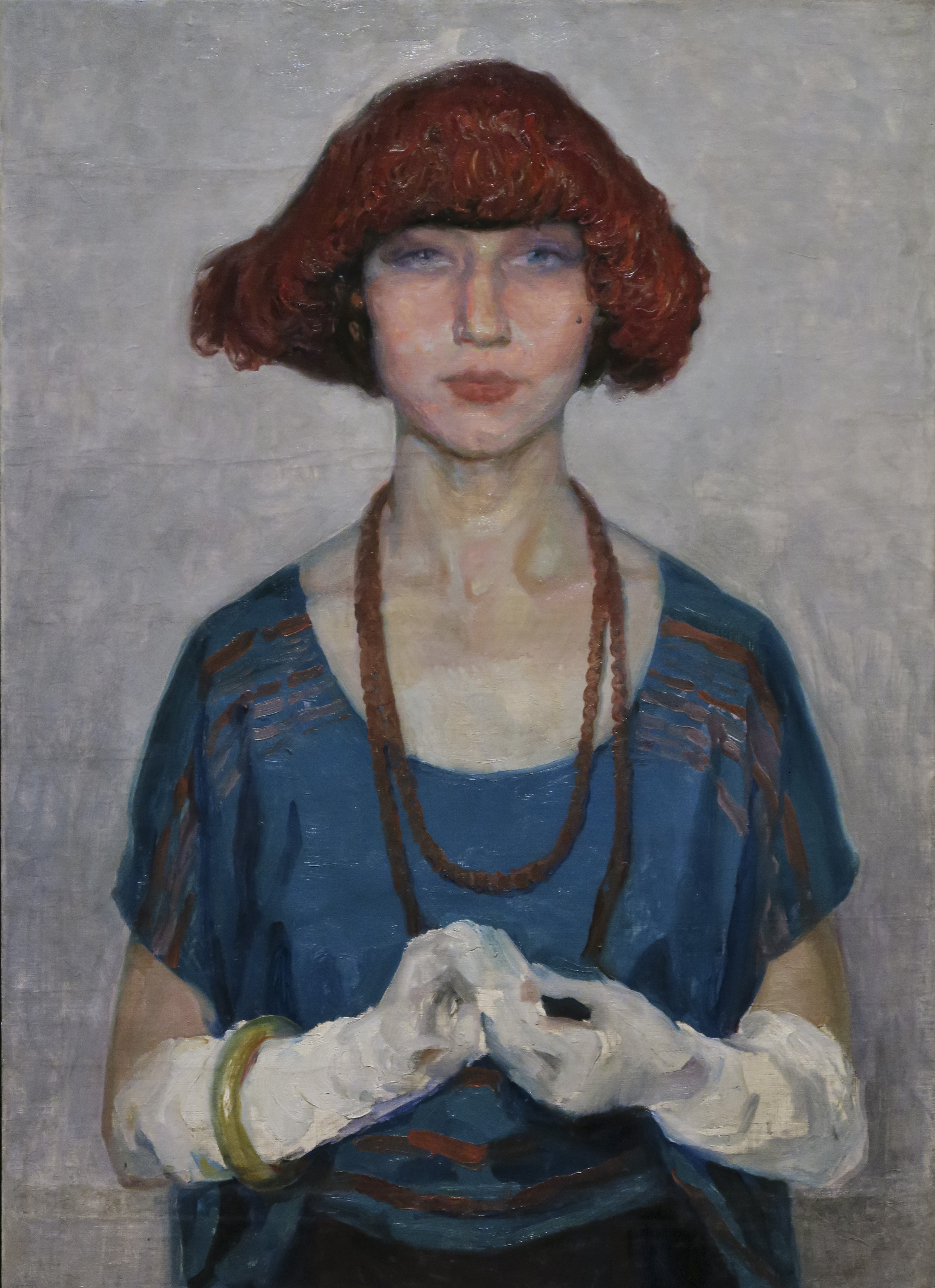 Obra de Adriano de Sousa Lopes